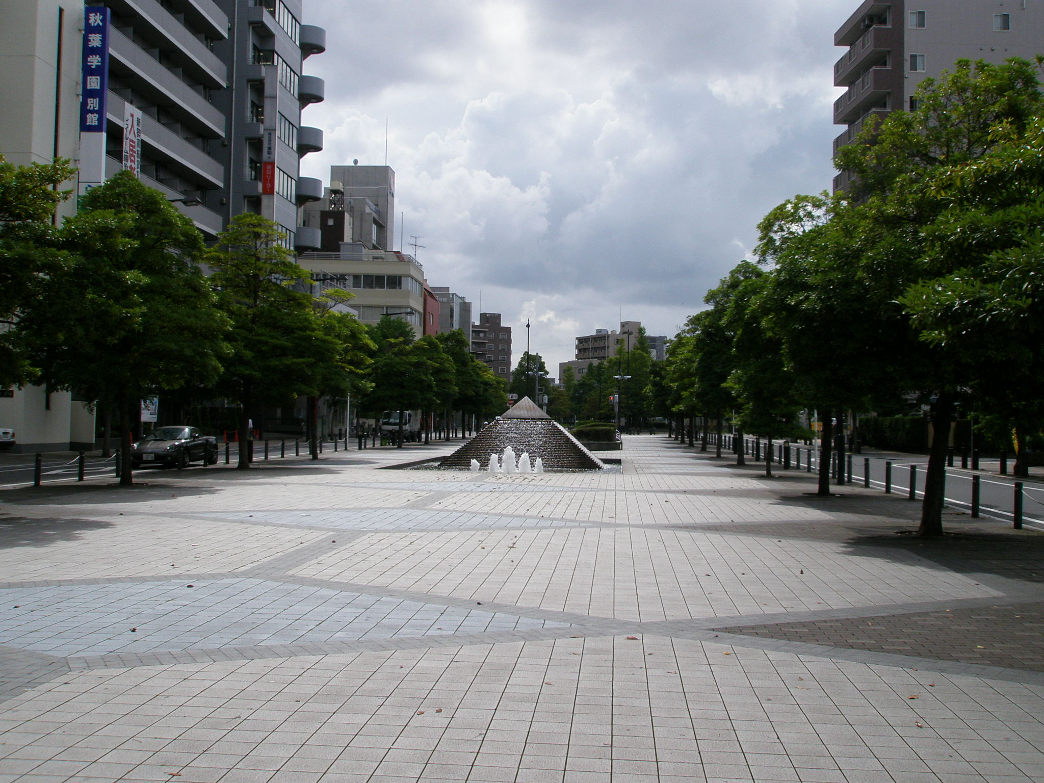 新宿公園（千葉市中央区）。京成千葉線・千葉中央駅から西側方向に伸びる。